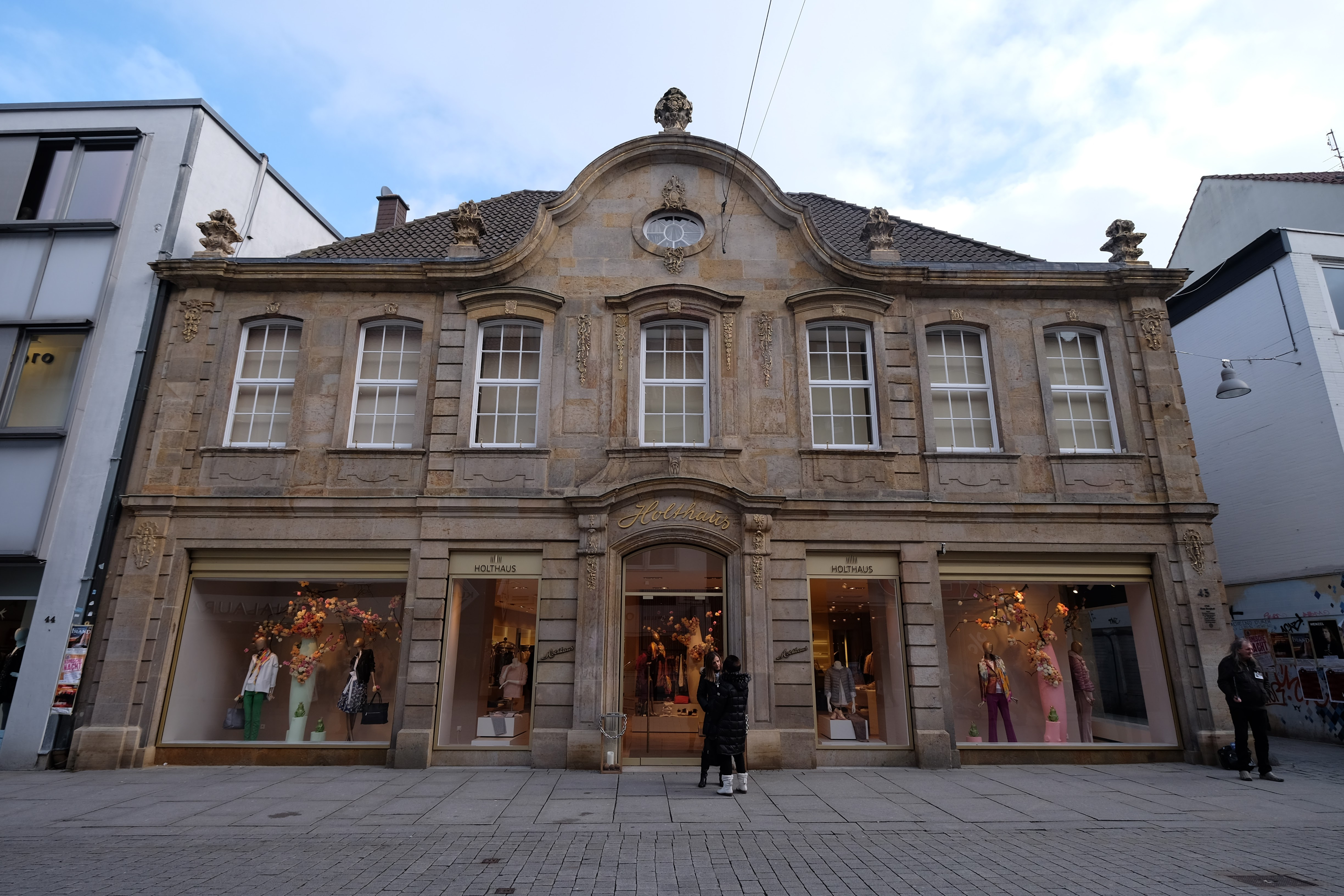 Innenstadt, 49074 Osnabrück, Germany